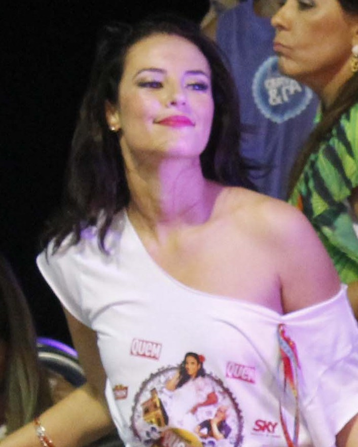 As atrizes Paola Oliveira e Samantha Schmütz, e o ator Joaquim Lopes.